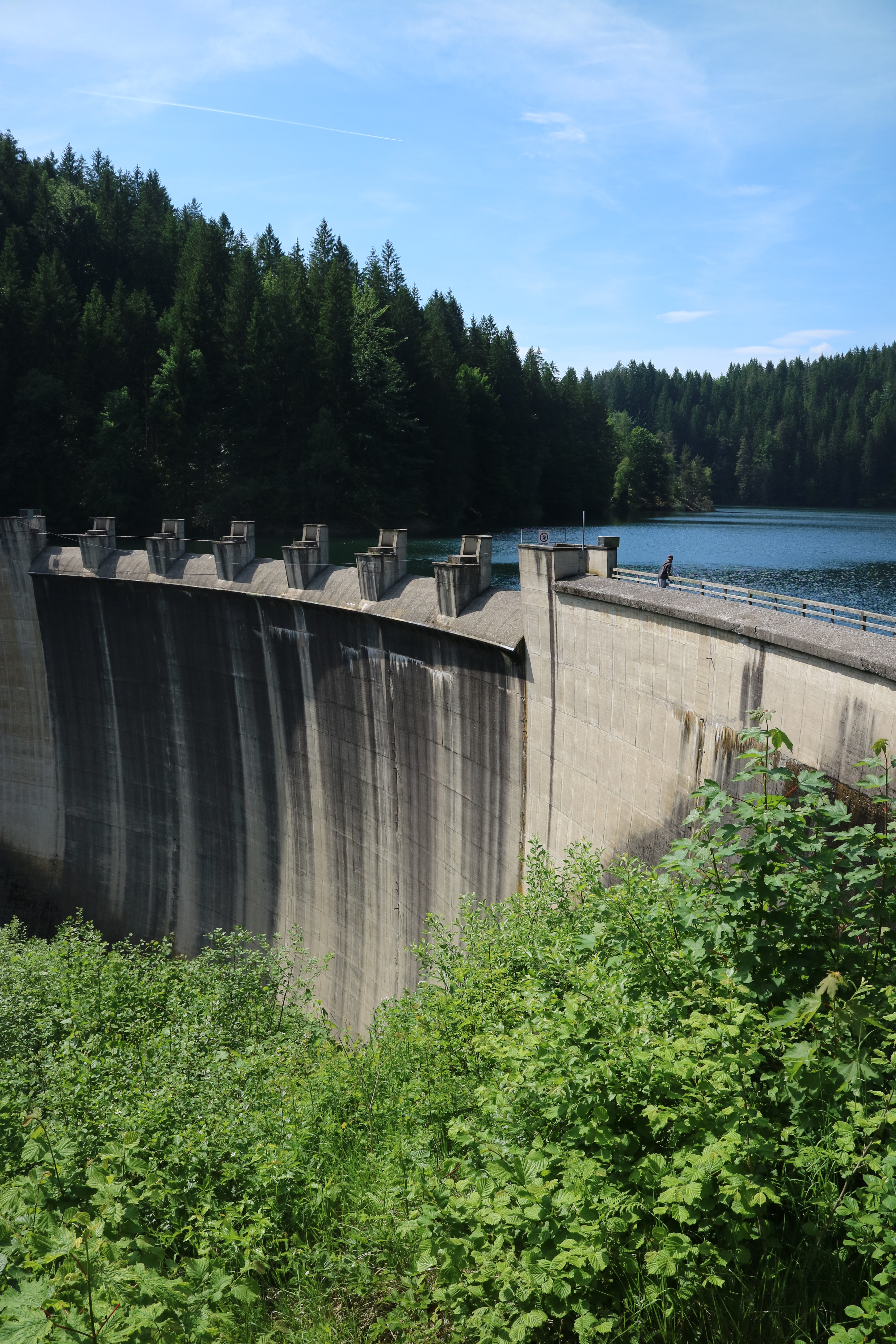 Hirzmannsperre, Gemeinde St. Martin am Wöllmißberg, Steiermark